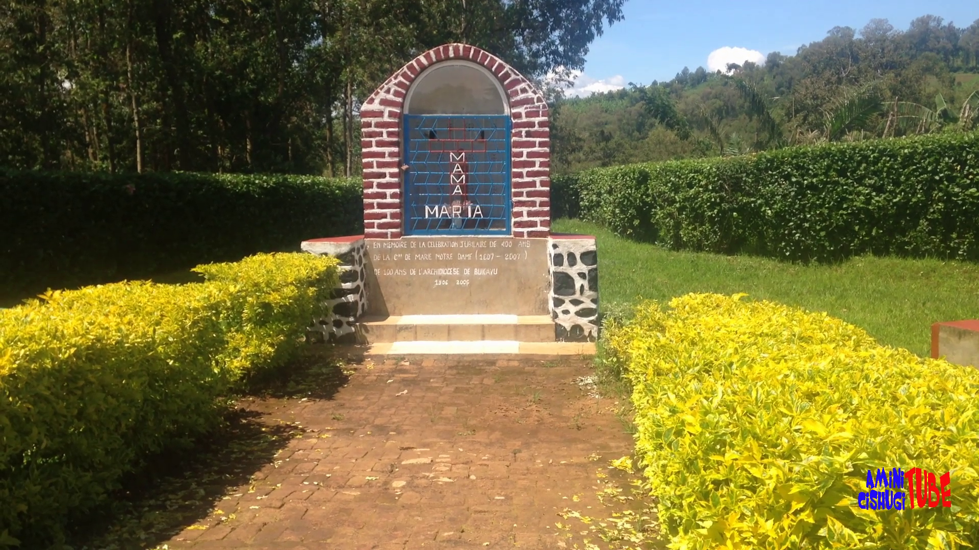 La grotte de Kashofu est un monument histoire construit devant l’Institut Kashofu à Idjwi.